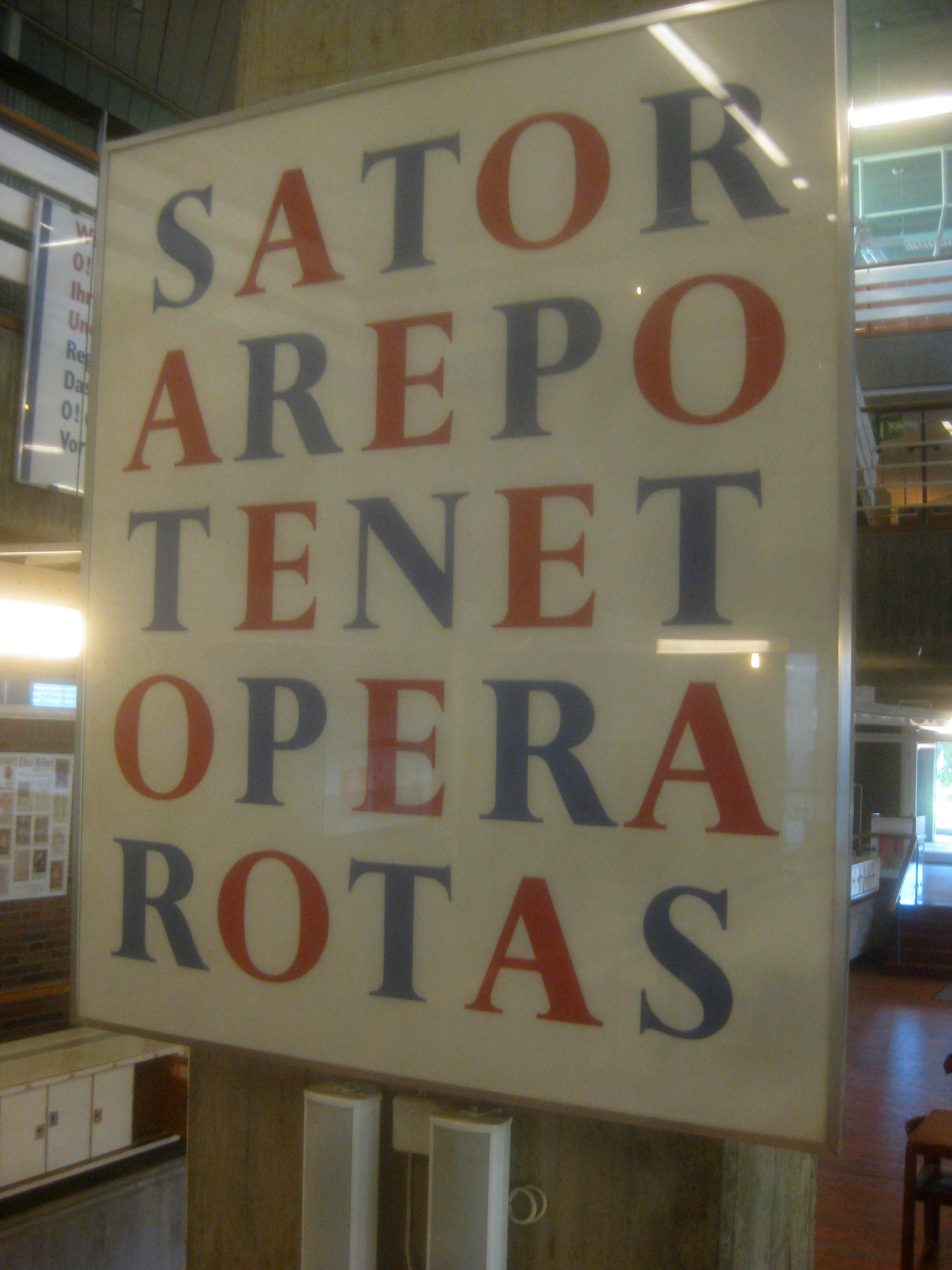 Josua Reichert, Lateinisches Palindrom, Werkverzeichnis SB 014, Württembergische Landesbibliothek, Stuttgart.